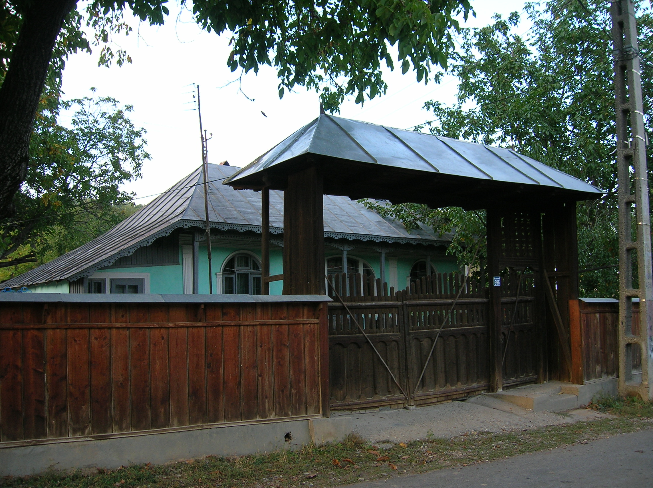 Comuna Valea Seacă Bacău - Satul Valea Seacă - o casă tradiţională